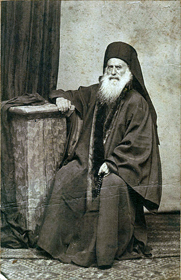 Греческий митрополит Червенский Синезий